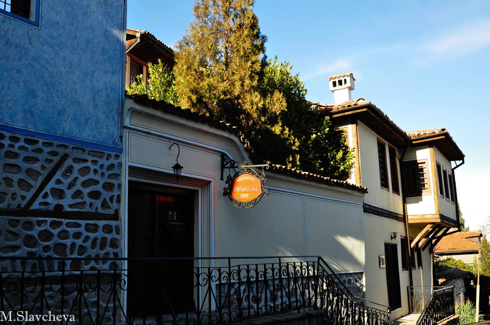 Фасада на къщата на д-р Владо